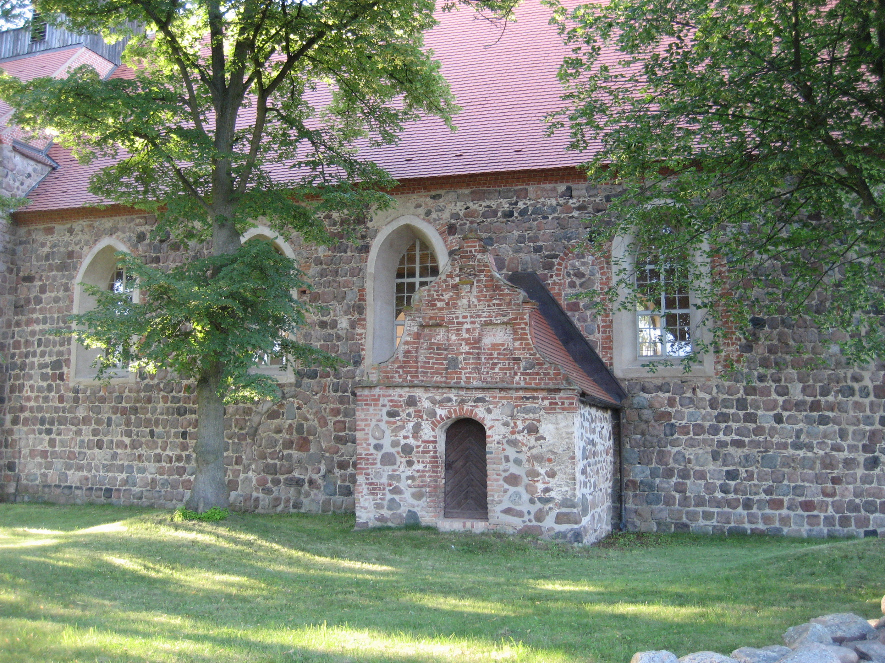 Südportal der Kirche Zerrenthin.